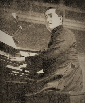 Raffaele Manari